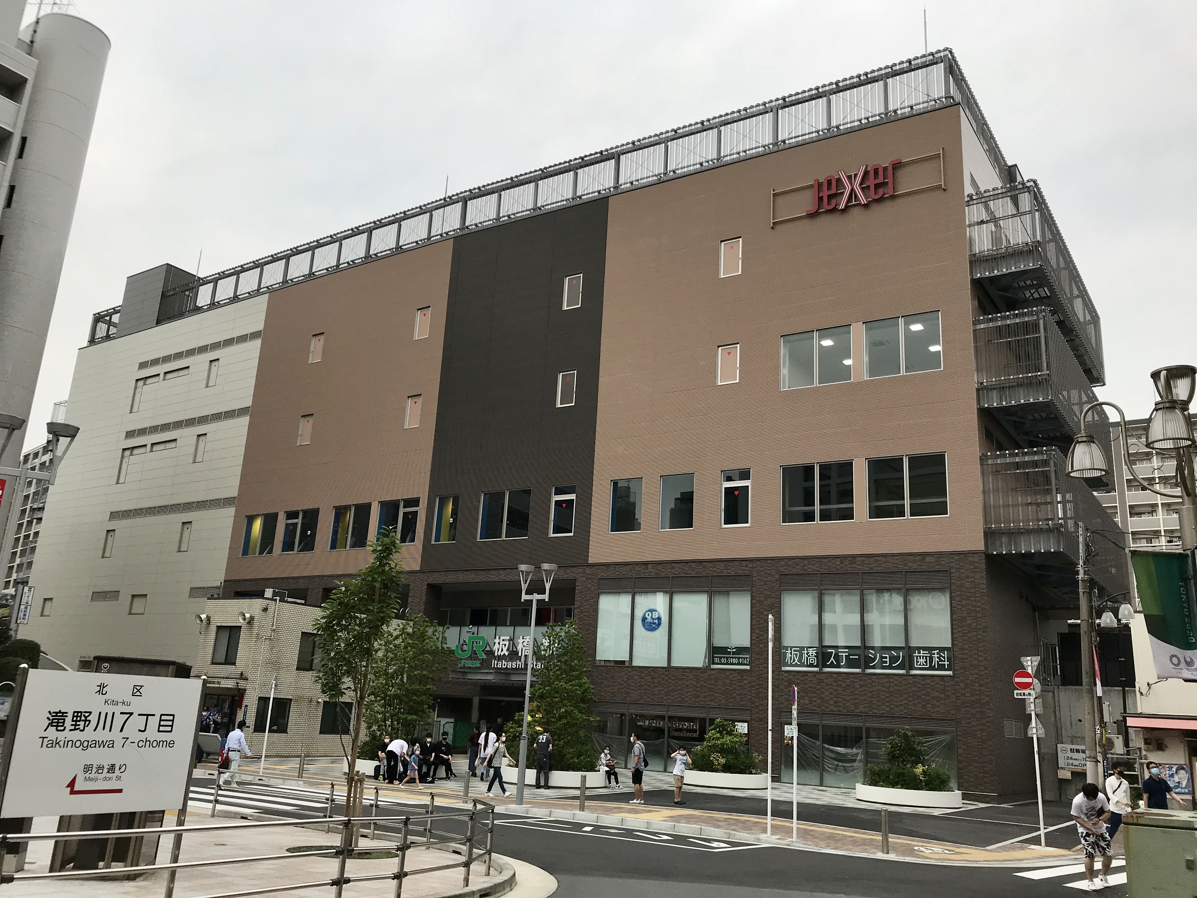 JR東日本赤羽線（埼京線）板橋駅東口駅舎